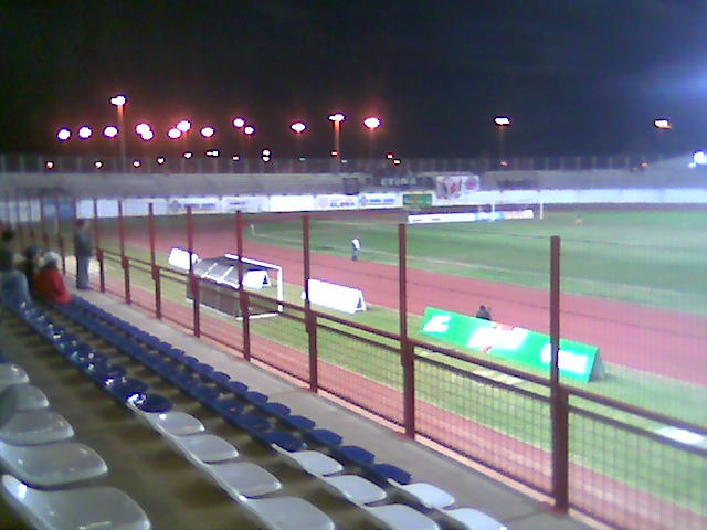 Complexo Esportivo da Ulbra no jogo de Ulbra X Joinville